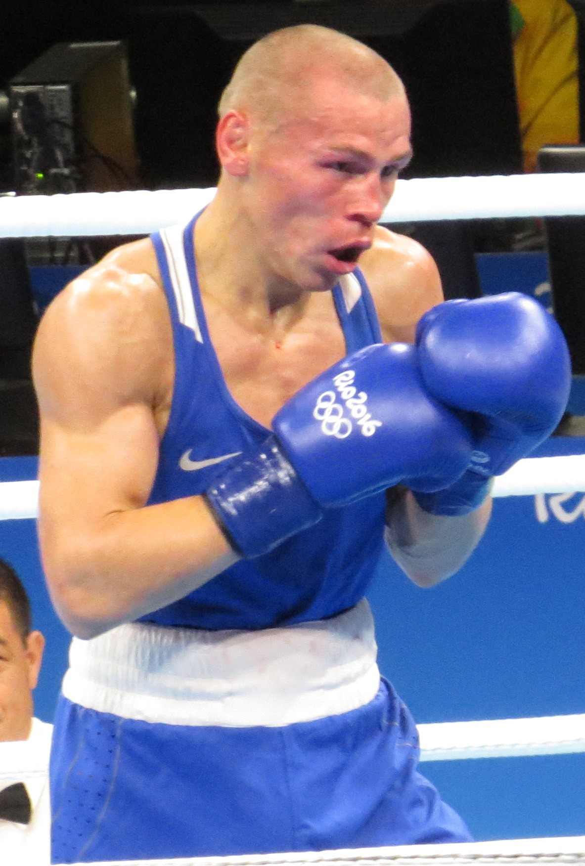 Sx50